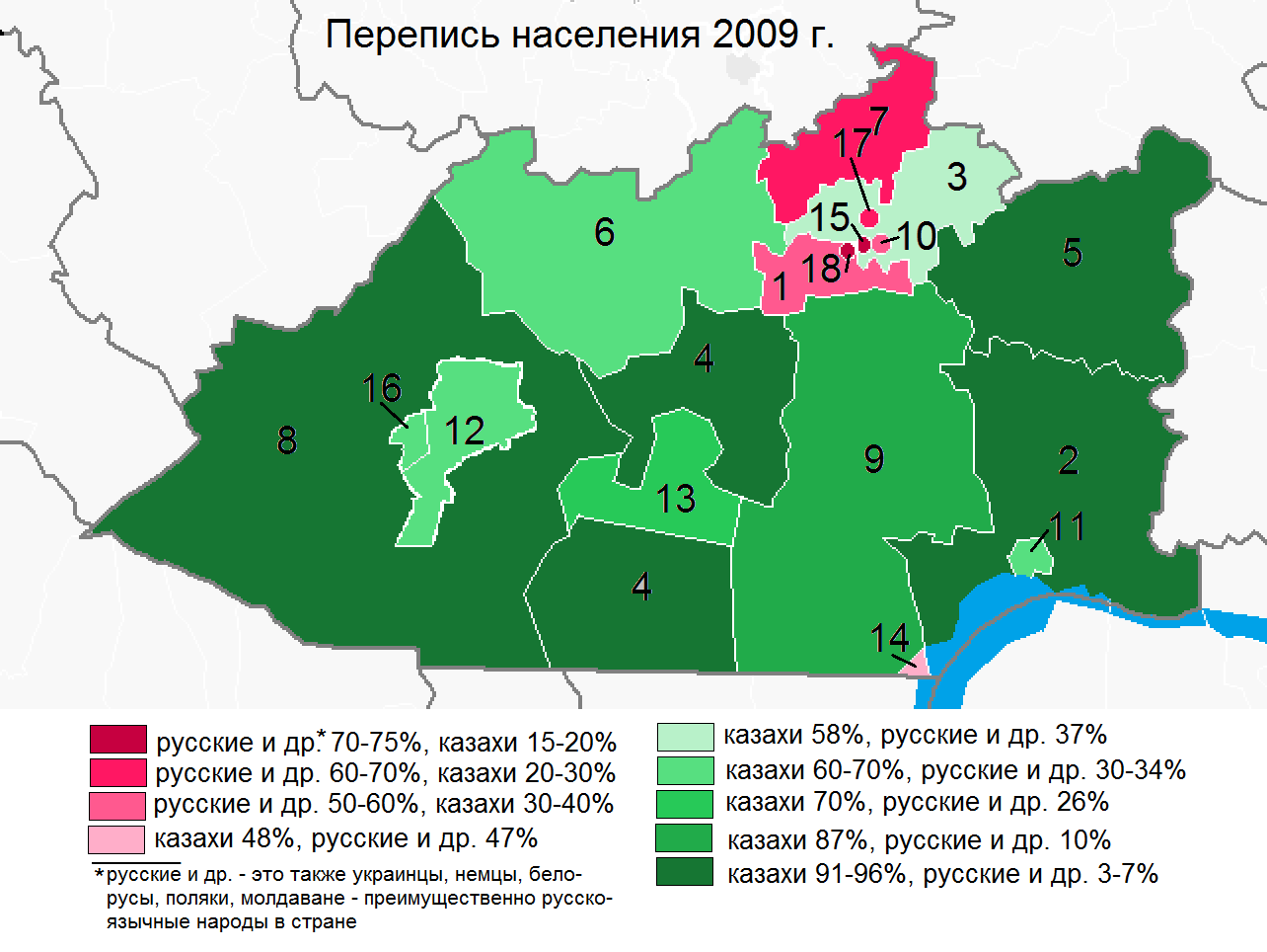 Доля казахов, русских и др. по районам Карагандинской области по переписи населения 2009 года